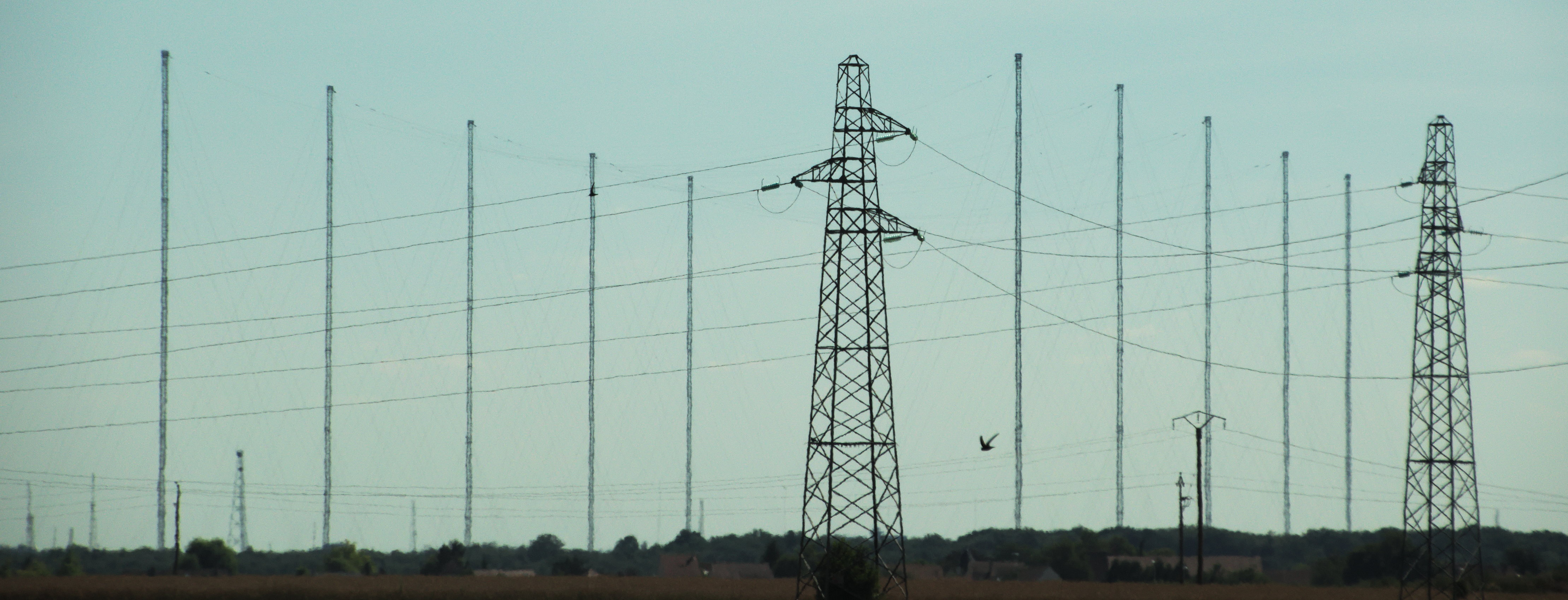 Émetteur de Sainte-Assise vu depuis l'Autoroute A6.